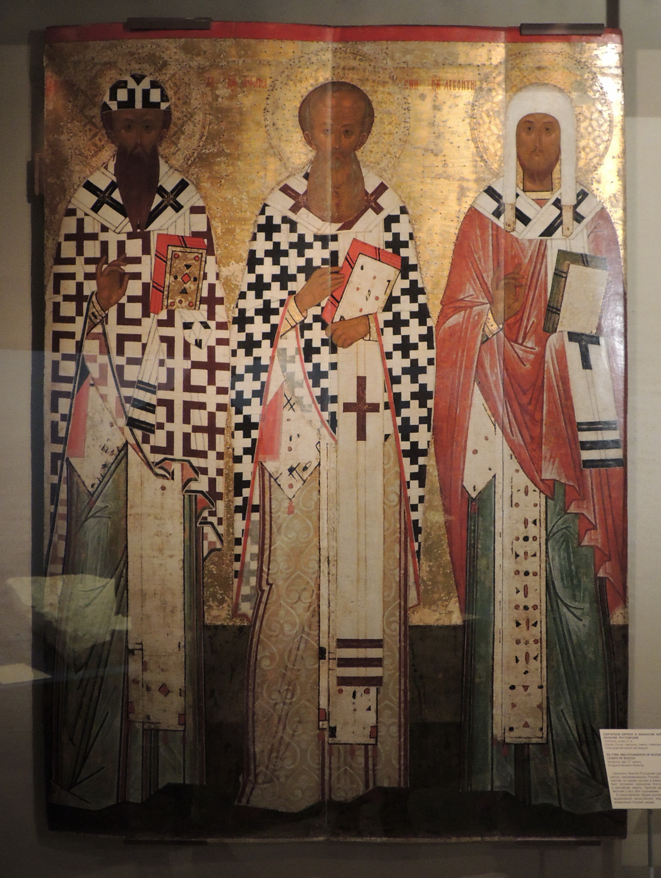 Выставка "Великий князь и государь всея Руси Иван III".